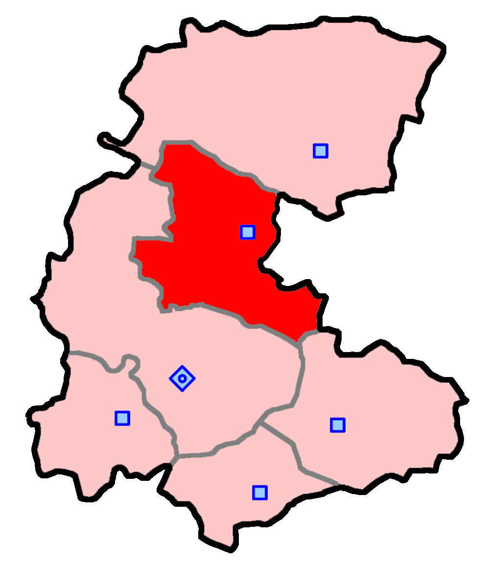 حوزهٔ انتخاباتی تفرش و آشتیان برای انتخابات مجلس شورای اسلامی